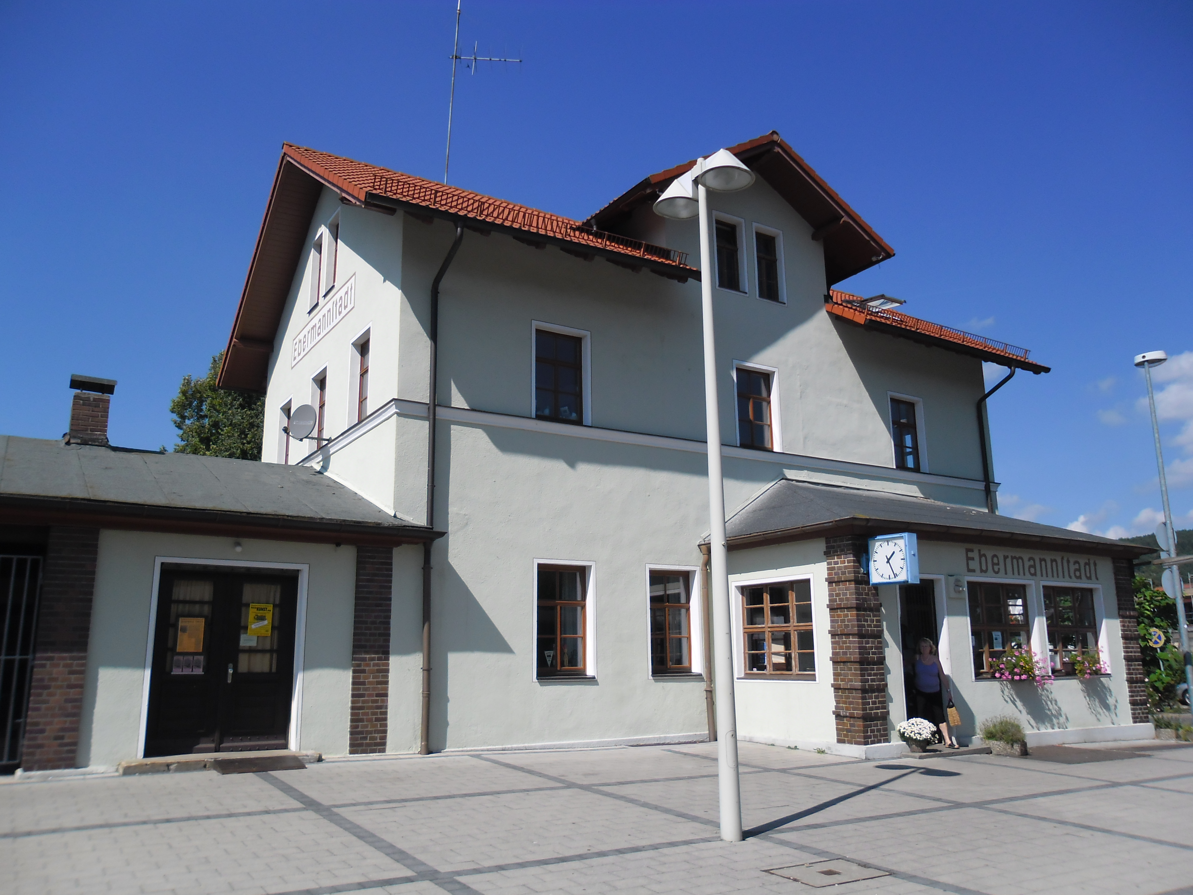 Bahnhofsgebäude Ebermannstadt